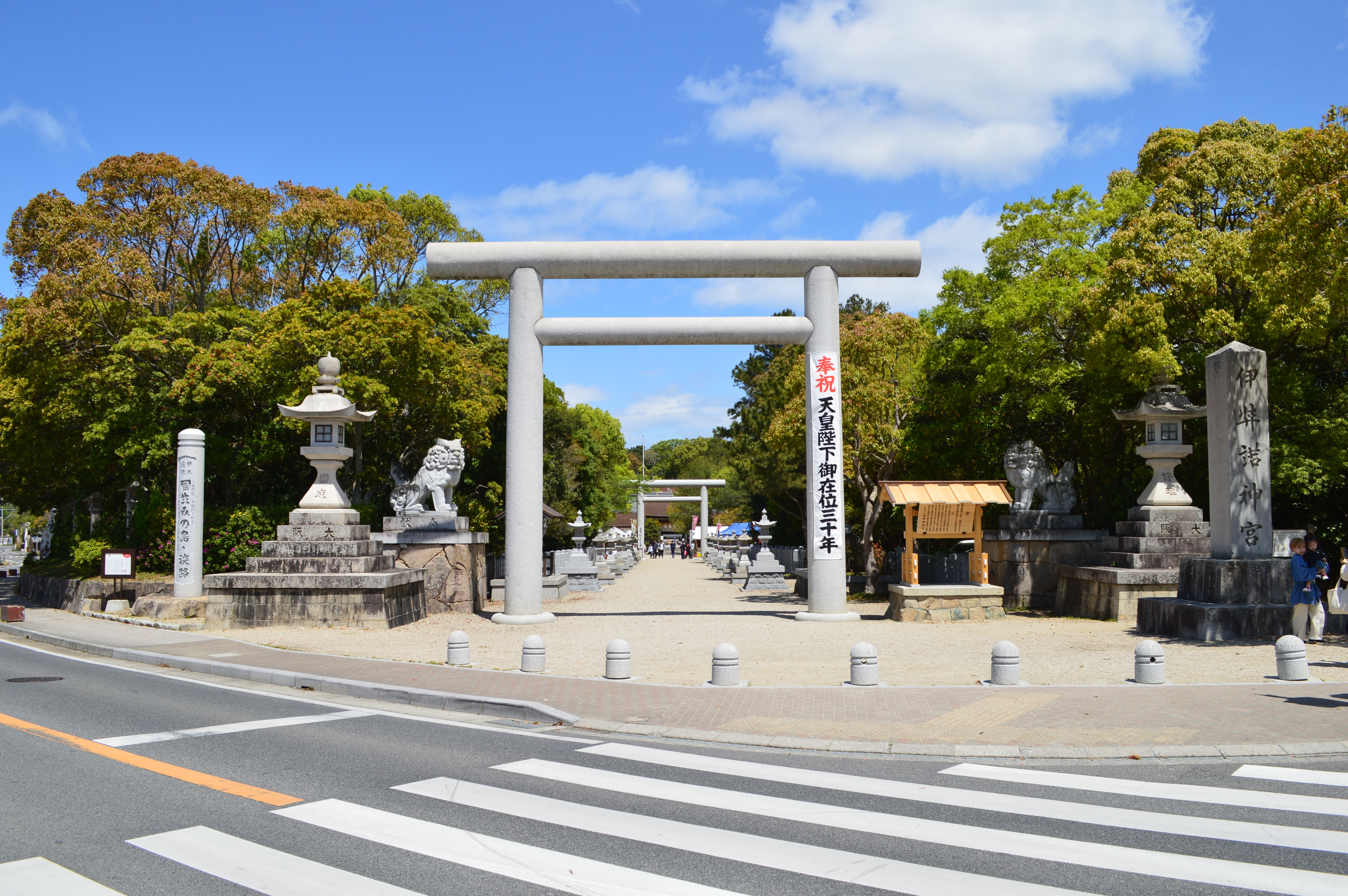 伊弉諾神宮 大鳥居 Nikon D3200